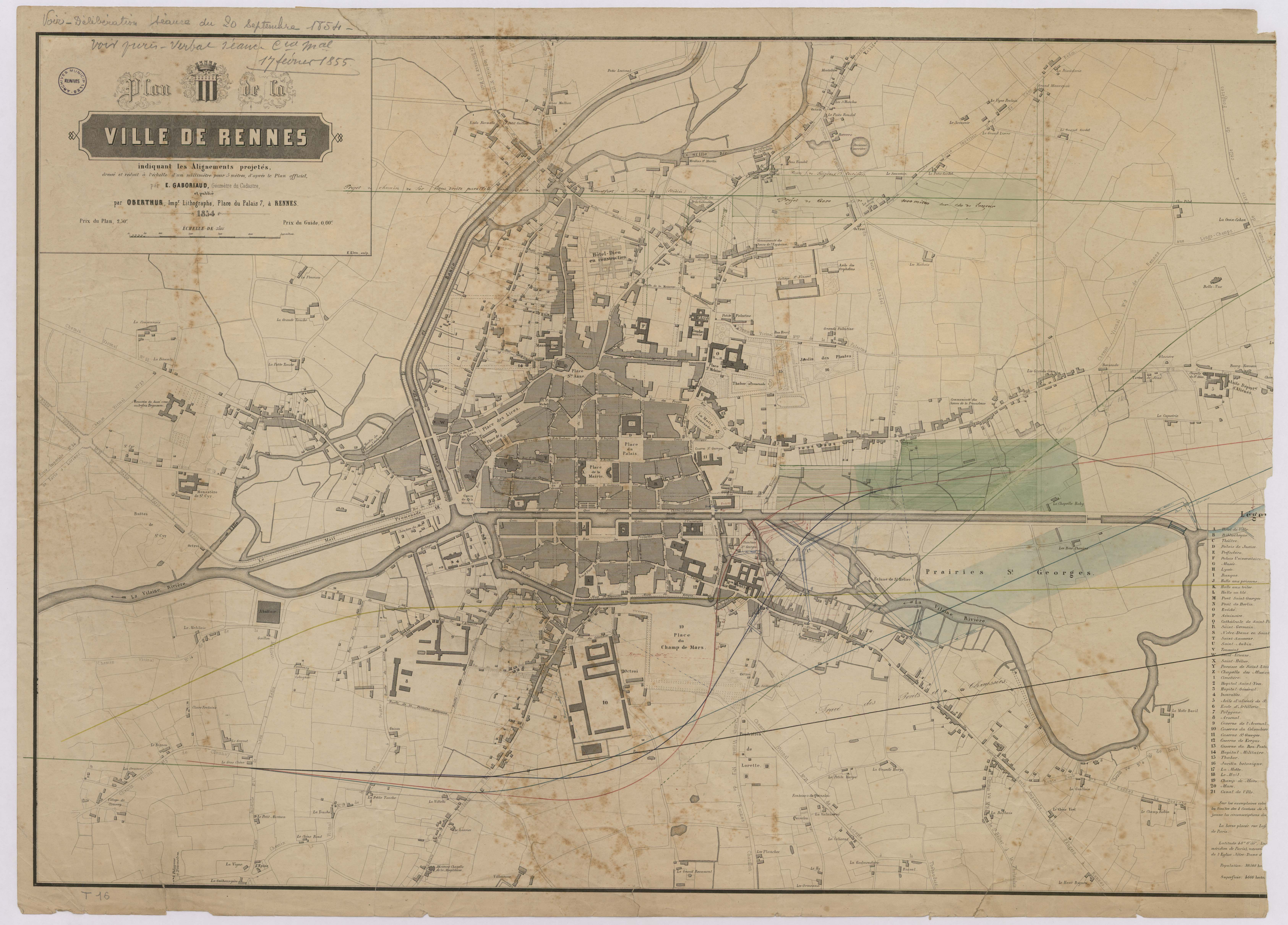 Plan de la ville de Rennes, indiquant les alignement projetés, dressé par E. Gaboriaud, géomètre du cadastre, publié par Oberthur. Document de travail avec localisation des projets de gare. Archives municipales de Rennes, 1 Fi 74